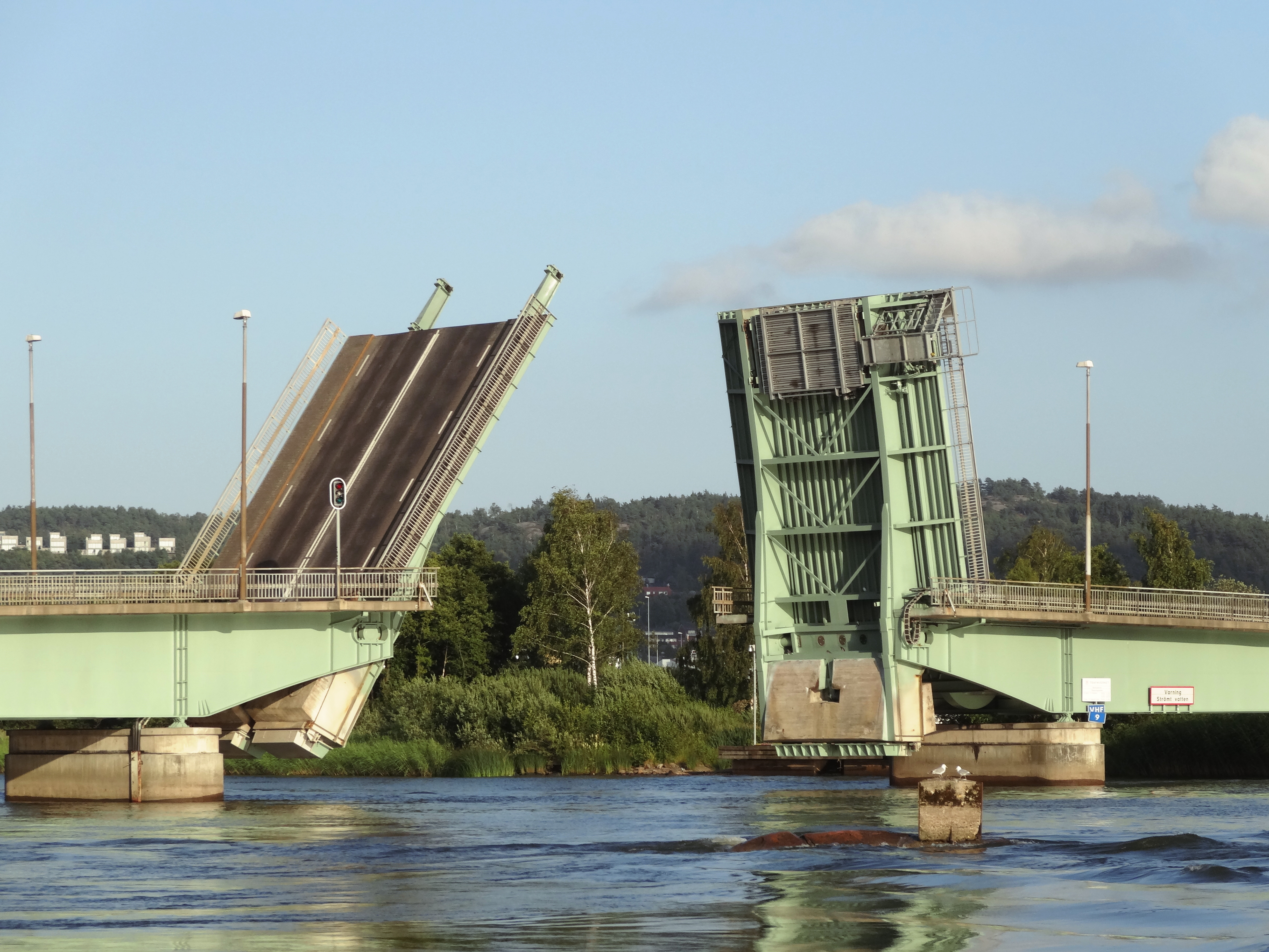 to be done soon